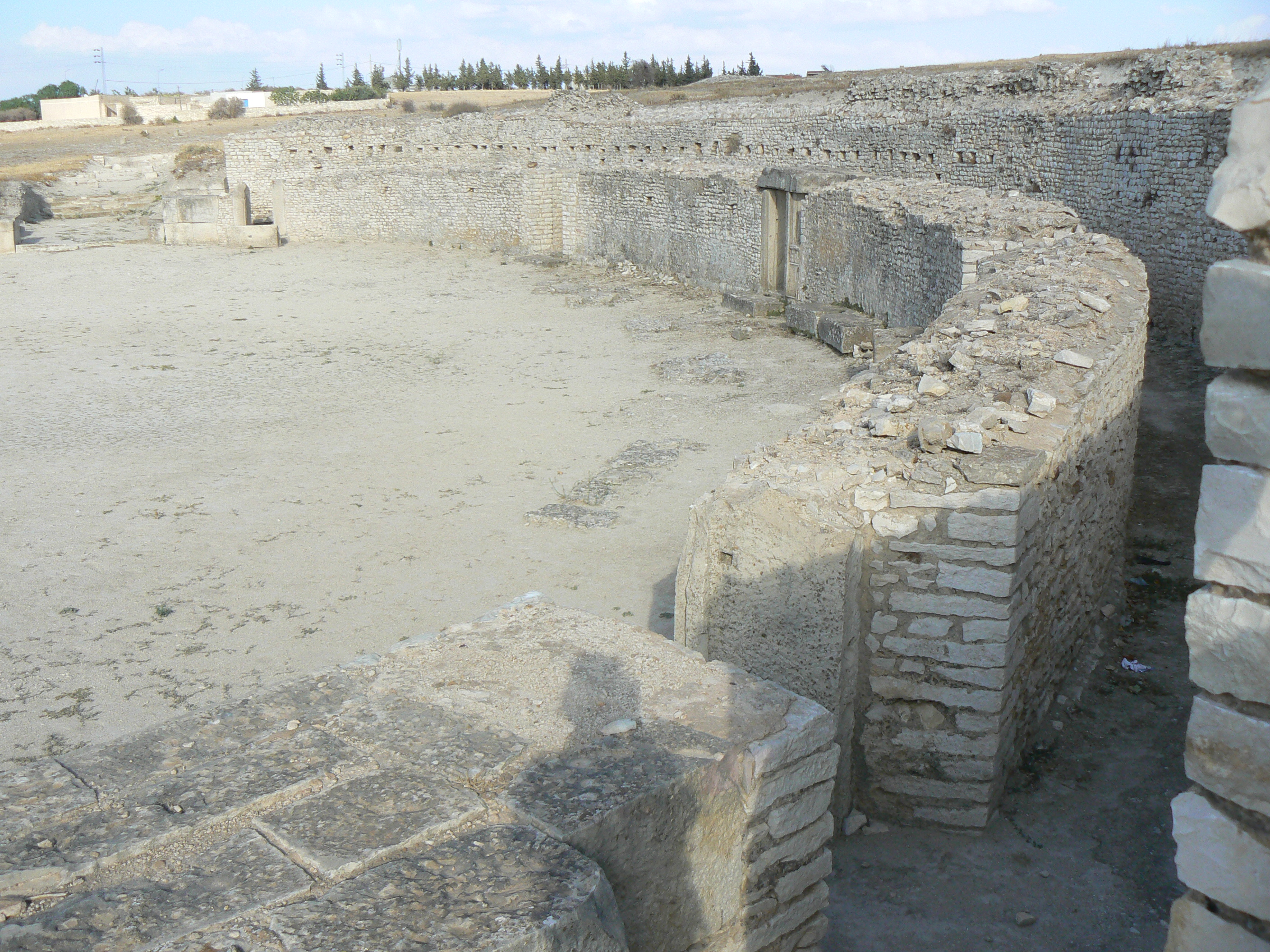 Portion de l'amphithéâtre de Makthar